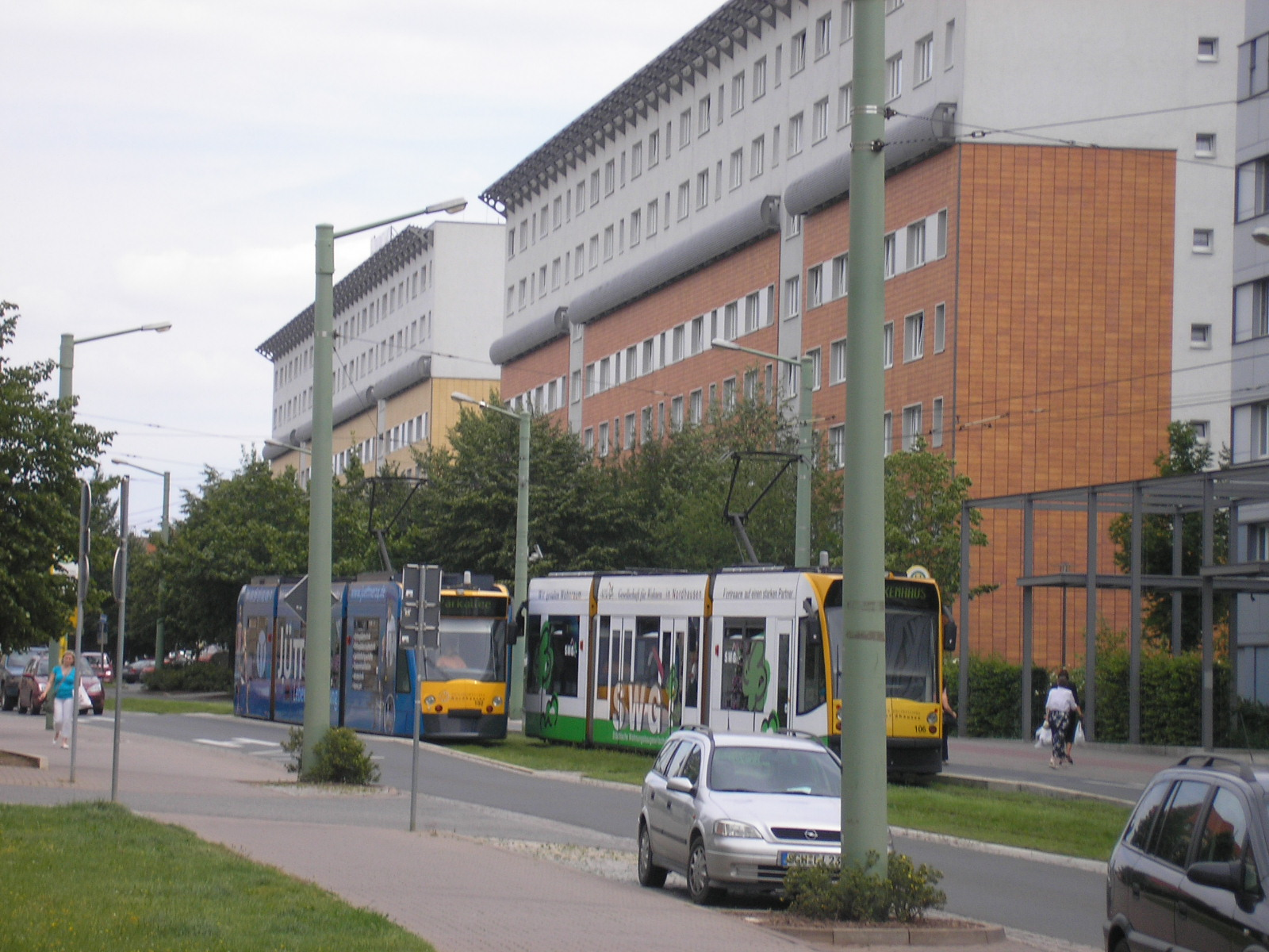 Straßenszene am Theaterplatz in Nordhausen (Thüringen).